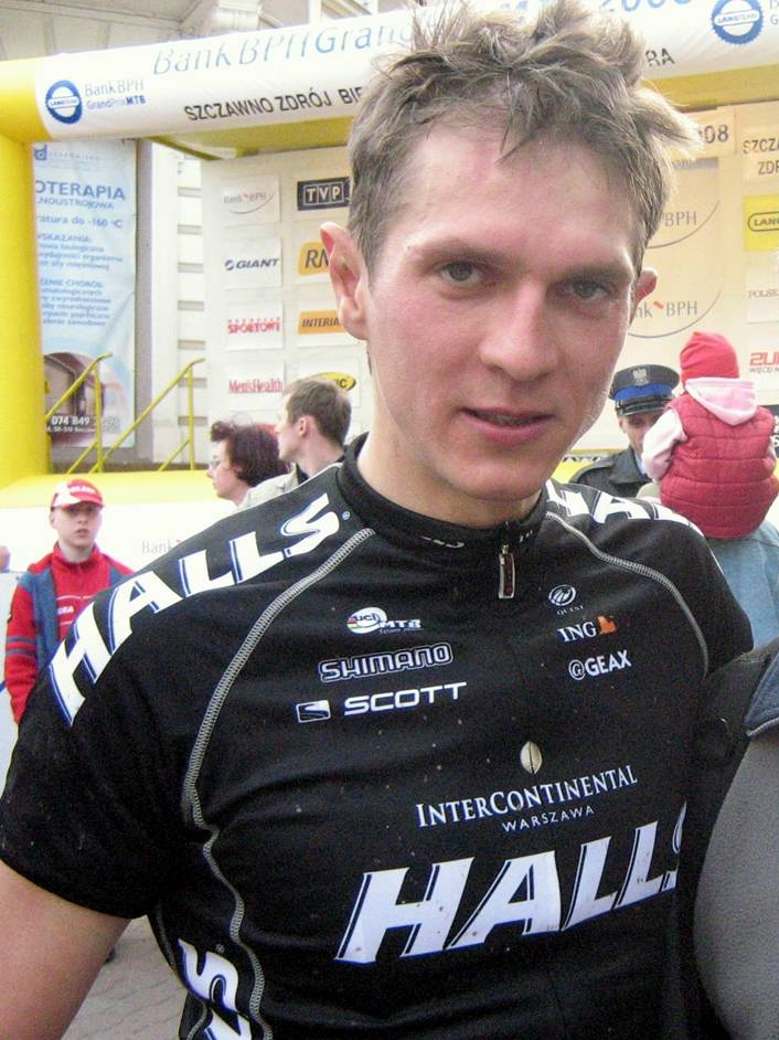 Marcin Karczyński – polski kolarz, olimpijczyk z 2004 r.